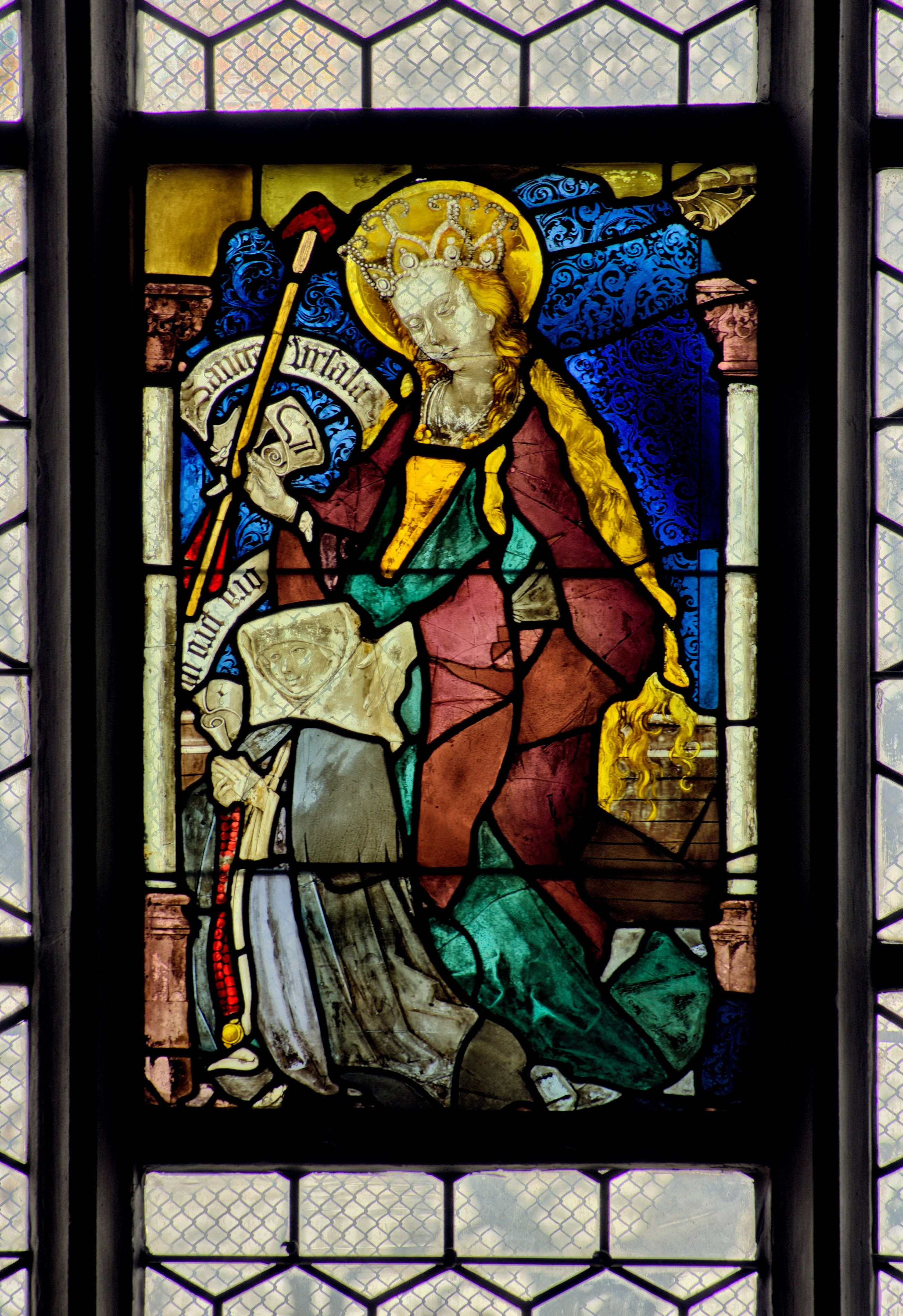 Bilder aus dem Augsburger Dom. Das St. Ursula Fenster.